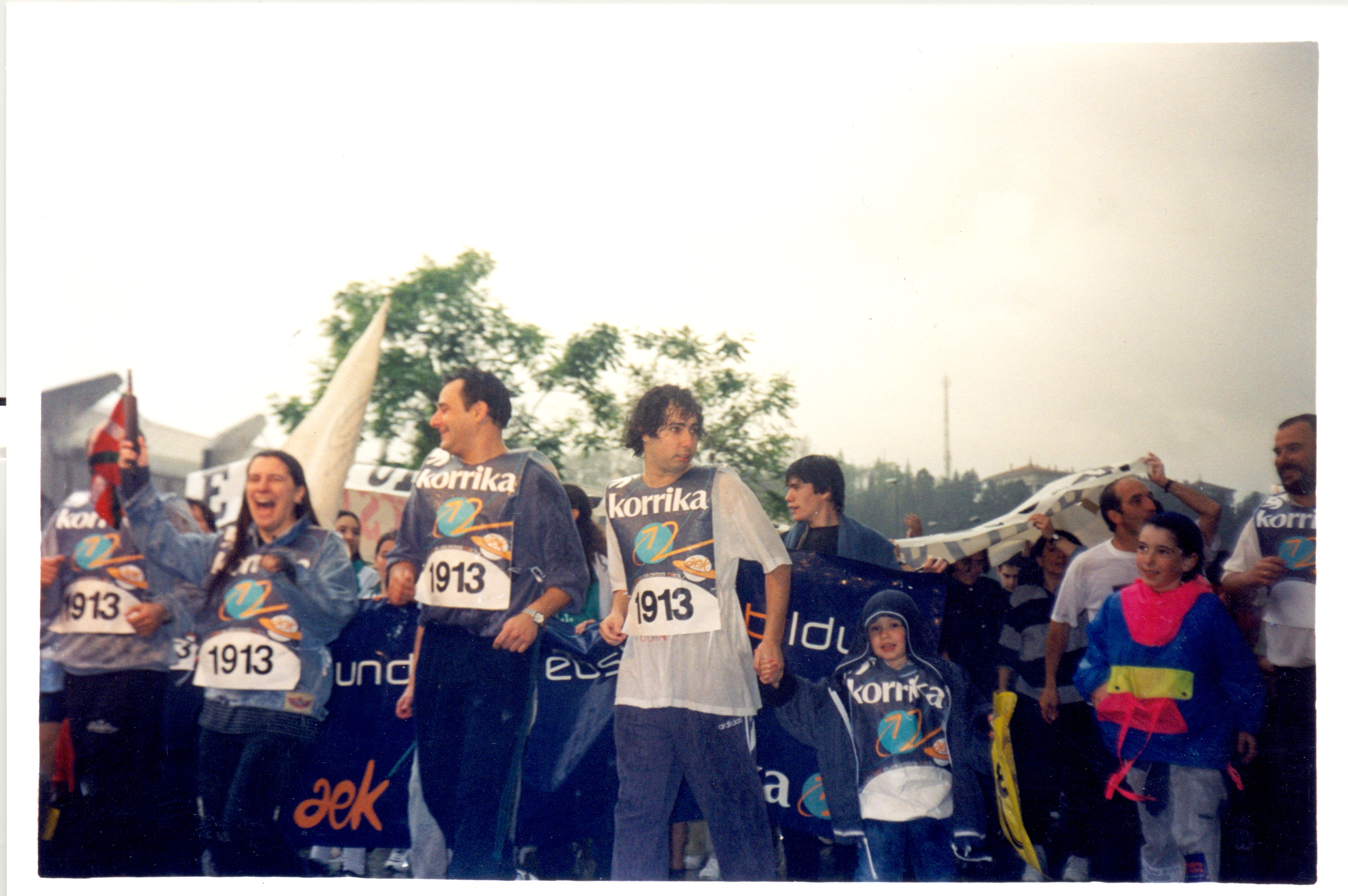 Korrika 12.Aita Donostia Plaza zeharkatzen, atzean Anoeta / La 12a edición de la Korrika a su paso por la plaza Padre Donostia, detrás Anoeta. Colección AMARAuna Bilduma 2001 Er. 558 Iturria / Fuente: Mertxe Mardaras Informazio gehiago / Más información: Amarako Ernest Lluch Kultur Etxeko Liburutegia / Biblioteca del Centro Cultural Ernest Lluch de Amara (Donostia-San Sebastián). Korrika, popular relay race in support of the Basque language across Donostia-San Sebastián